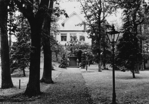 Villa vid Saltsjöpromenaden 18 i Saltsjöbaden, även kallad "Kråkslottet" (detalj)